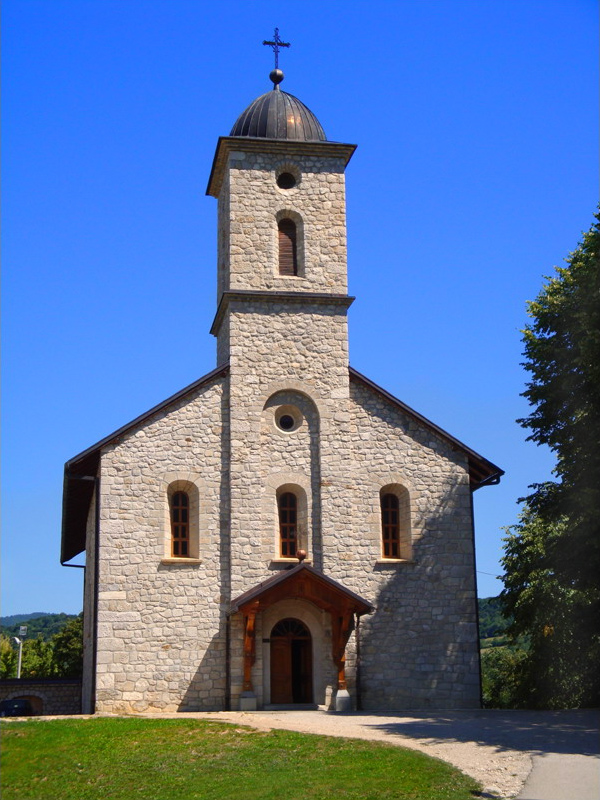 Манастирска црква у Крупи на Врбасу